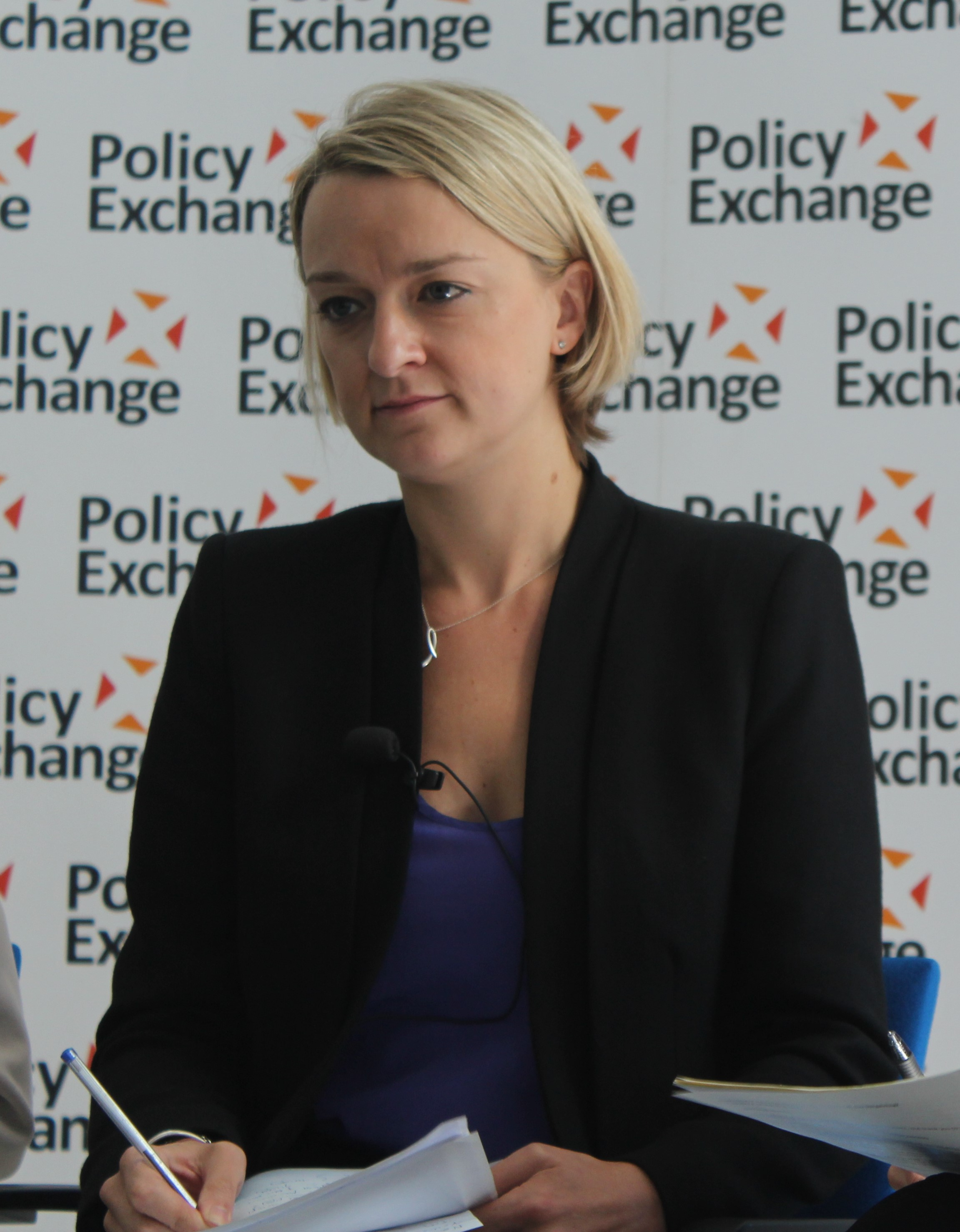 Laura Kuenssberg (born 1976)